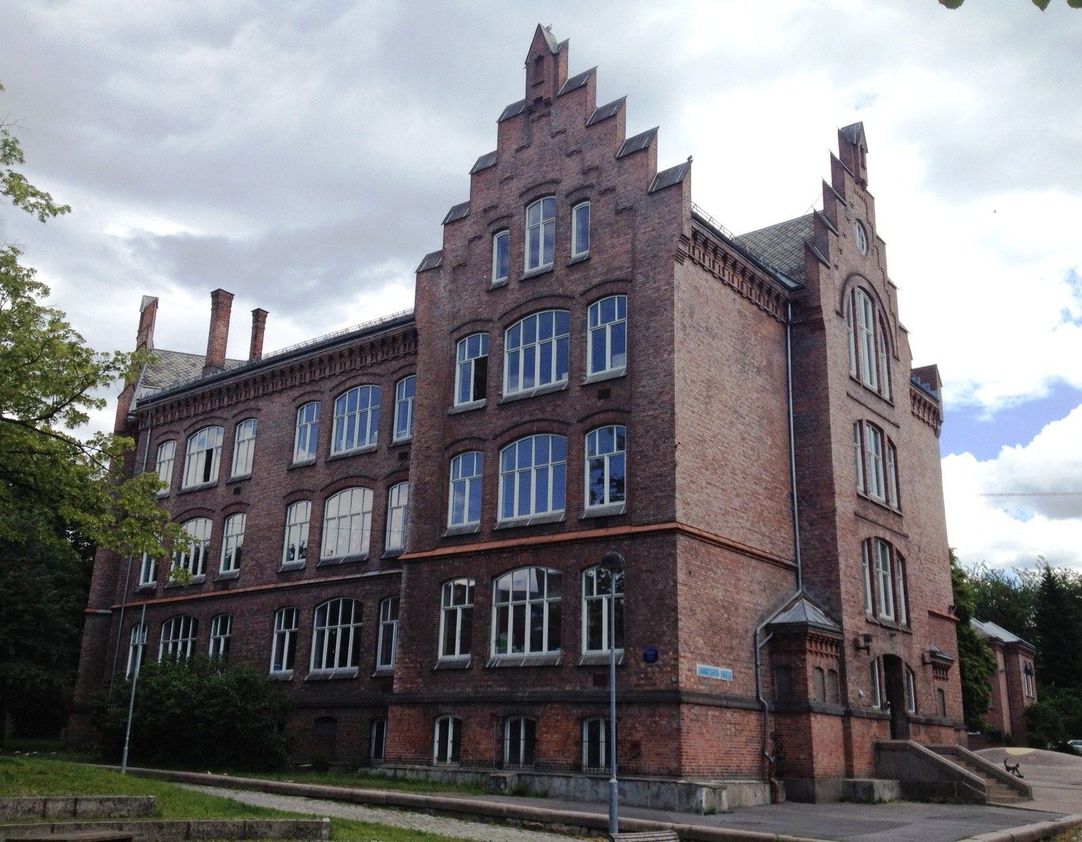 lakkegata Skole, Oslo